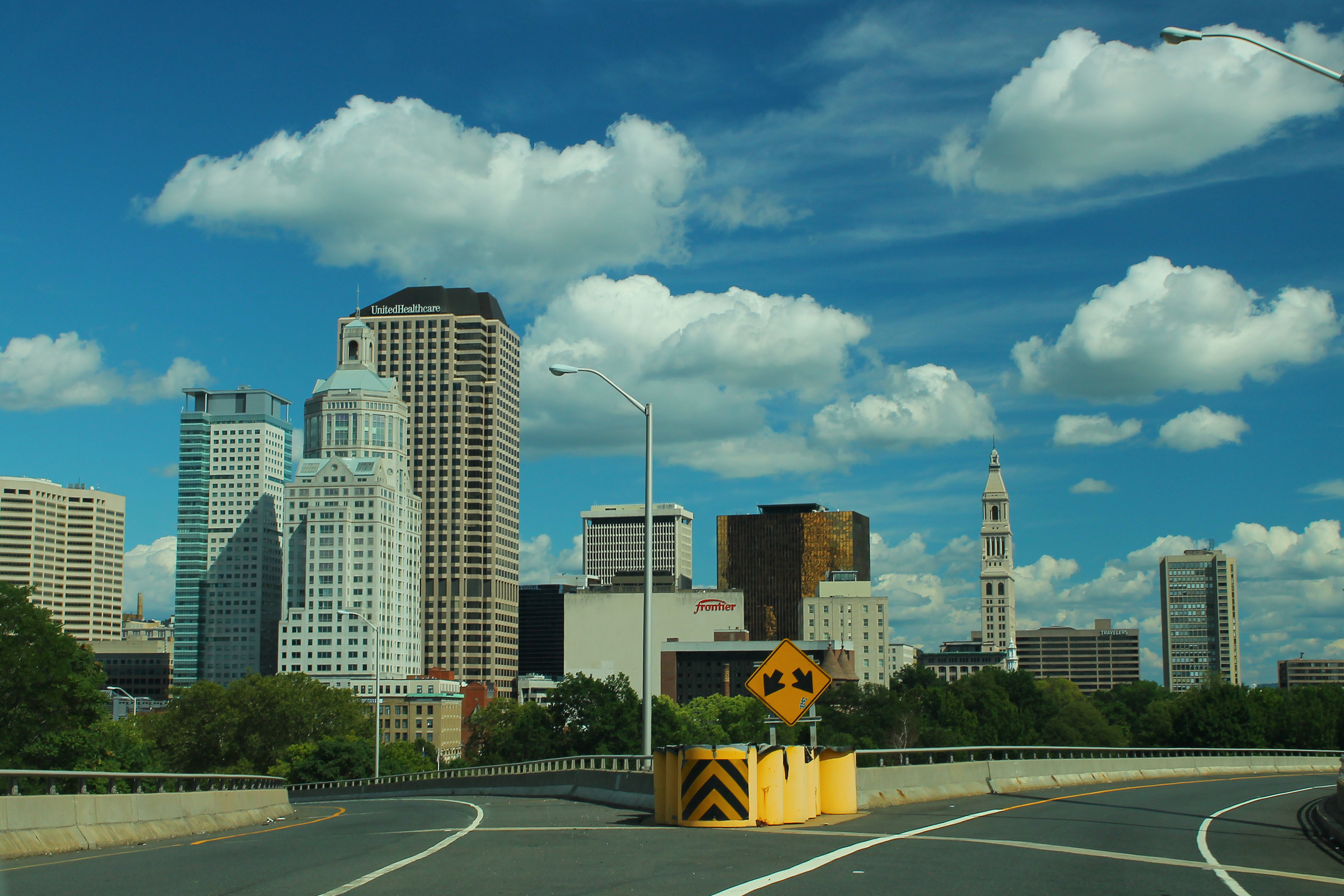 HartfordSkyline-Int84Ramps